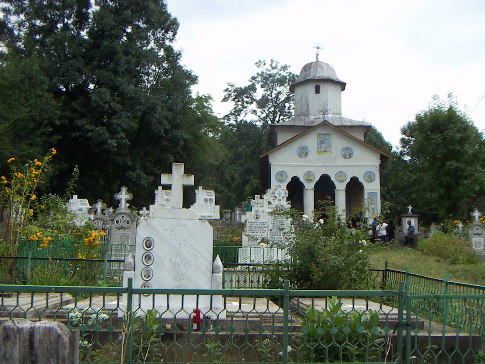 Biserica "Buna Vestire" din oraşul Tismana, Gorj construită la 1720, ref. sec. XX